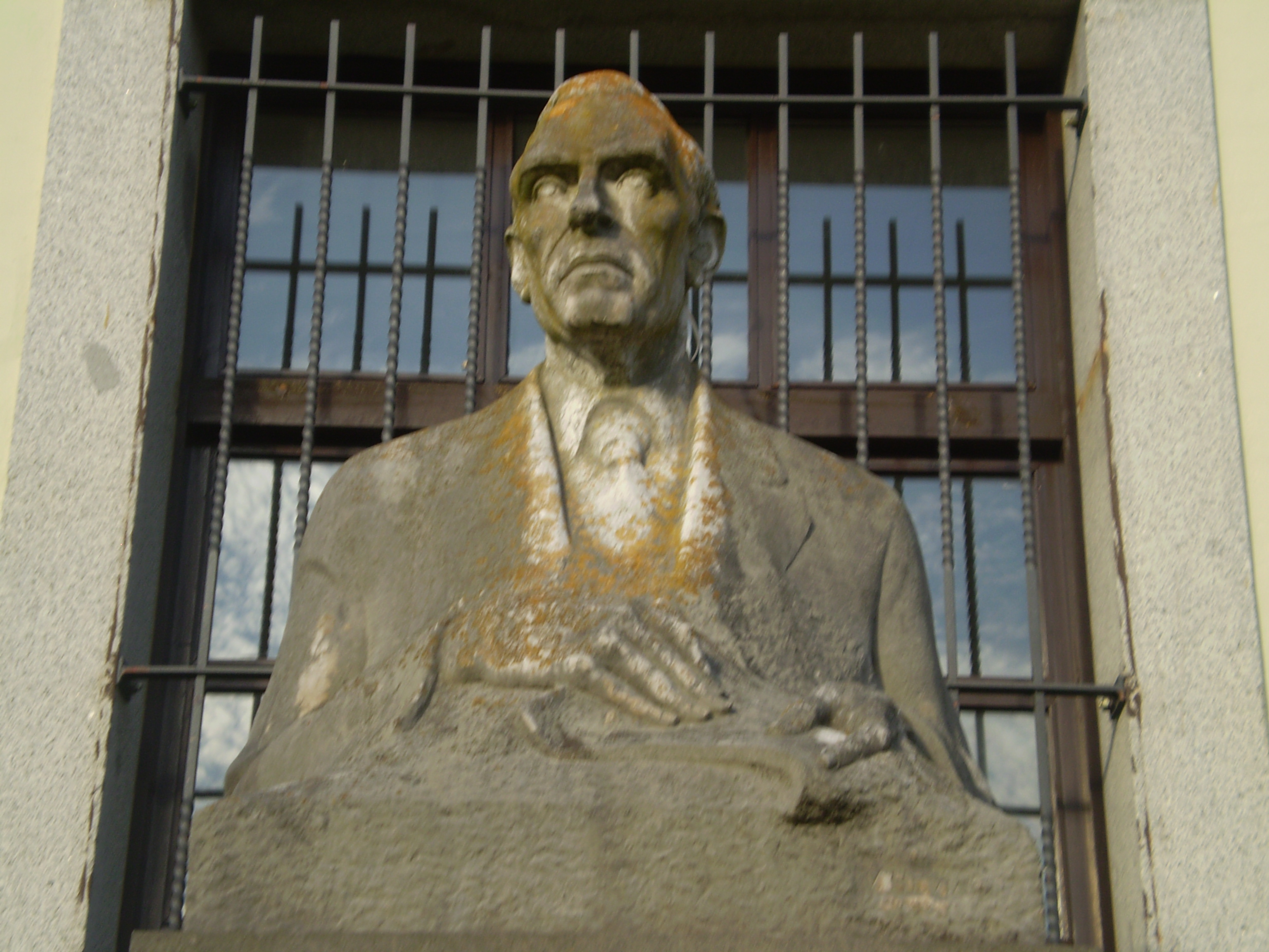 adolfo